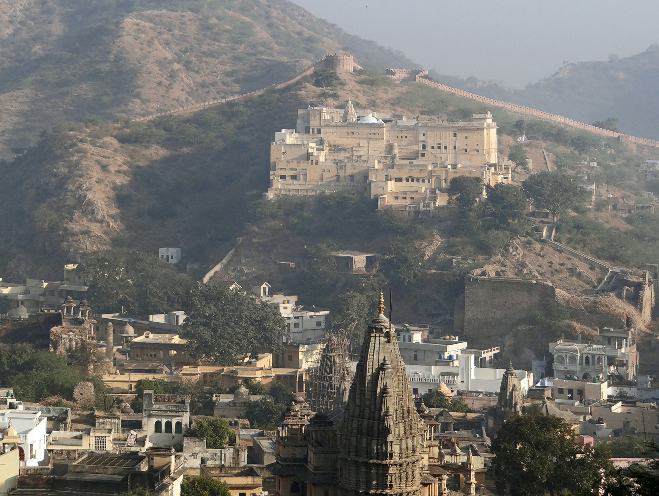 Vue de la petite ville d'Amber depuis le fort du même nom Au centre de la photo, un complexe architectural comprenant un temple hindou (Badrinath Temple) et un Hôtel. La ville ancienne d'Amber, ceinturée de remparts, a été désertée lorsque la ville de Jaipur a été construite, elle commence à se repeupler depuis quelques dizaines d'années. Article de Wikipedia sur le site d'Amber